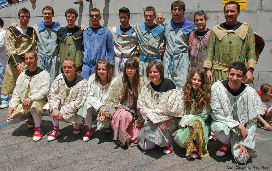 Mostra dels diferents vestits que es conserven de la comparsa (2012).